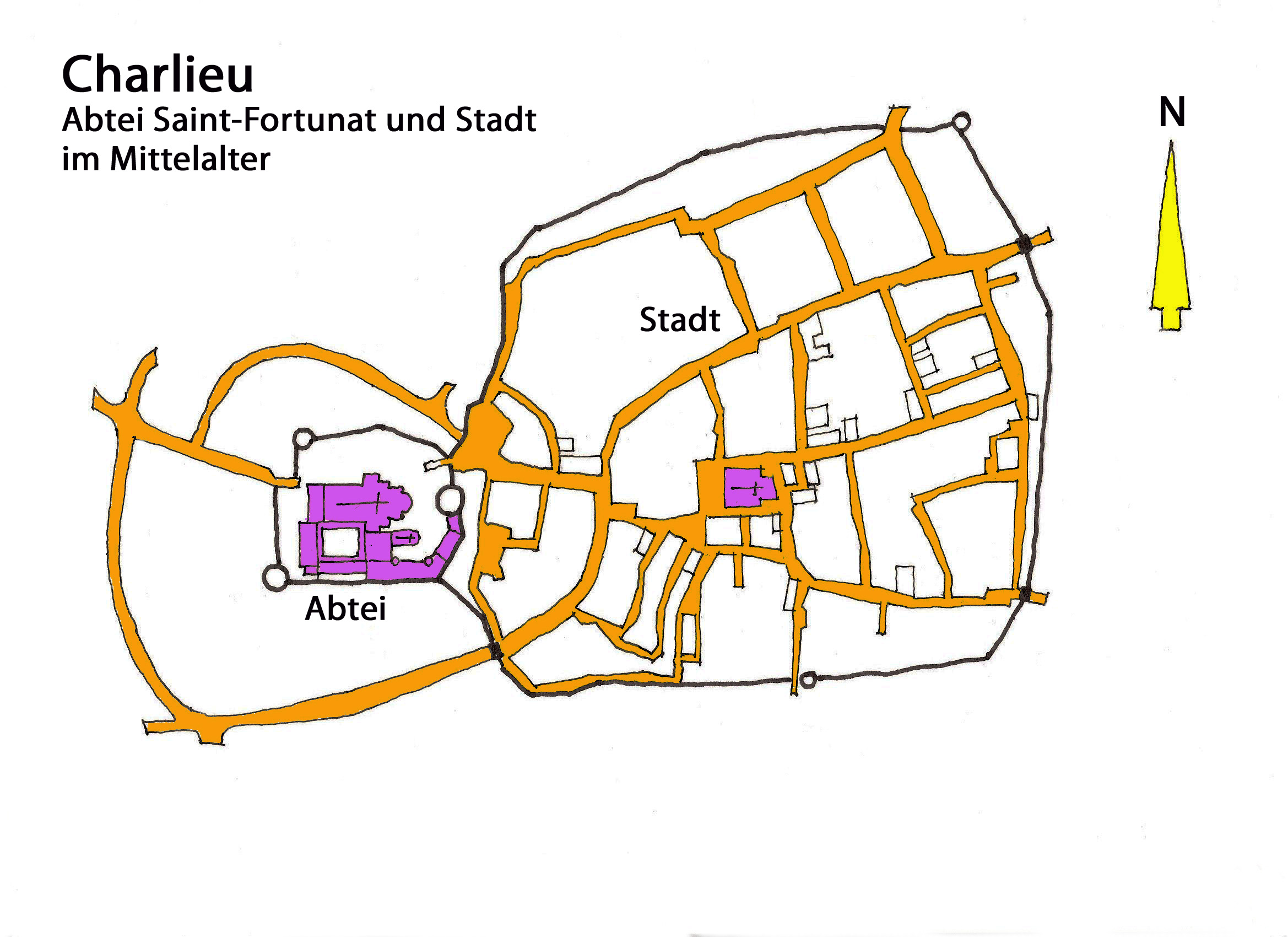 Charlieu im Mittelalter, Handskizze